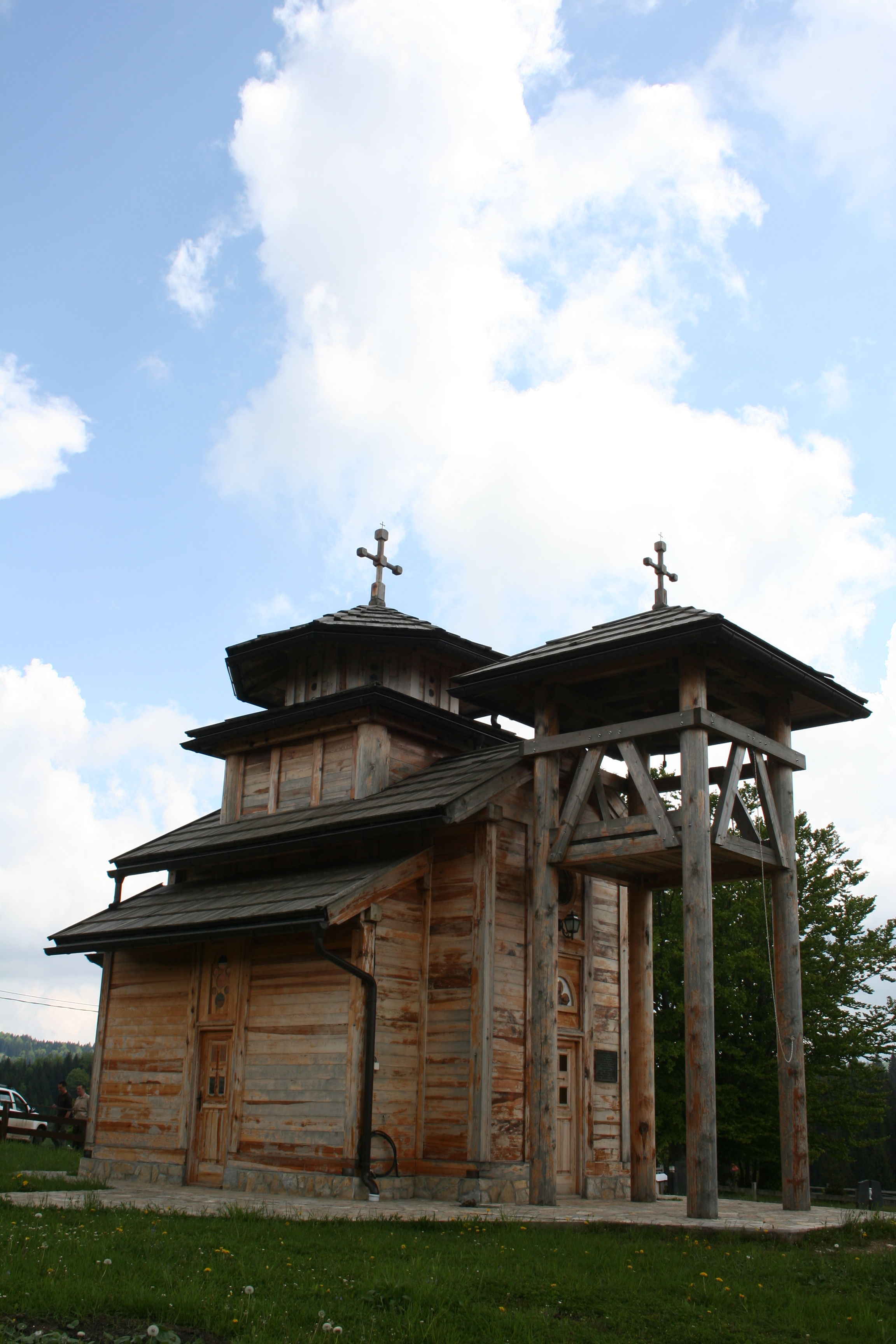 Crkva Sv. cara Lazara u Sekuliću